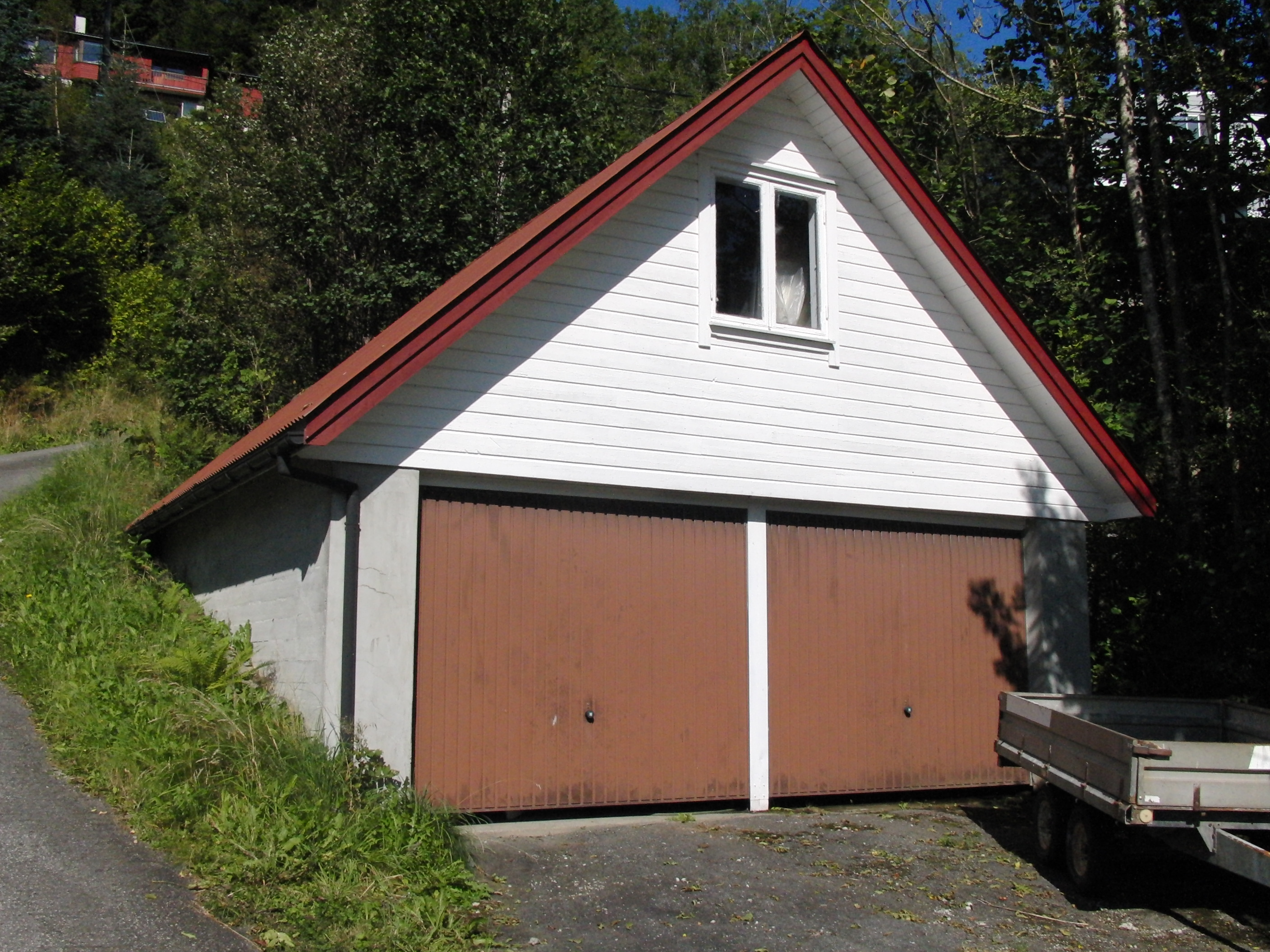 Luren kraftverk